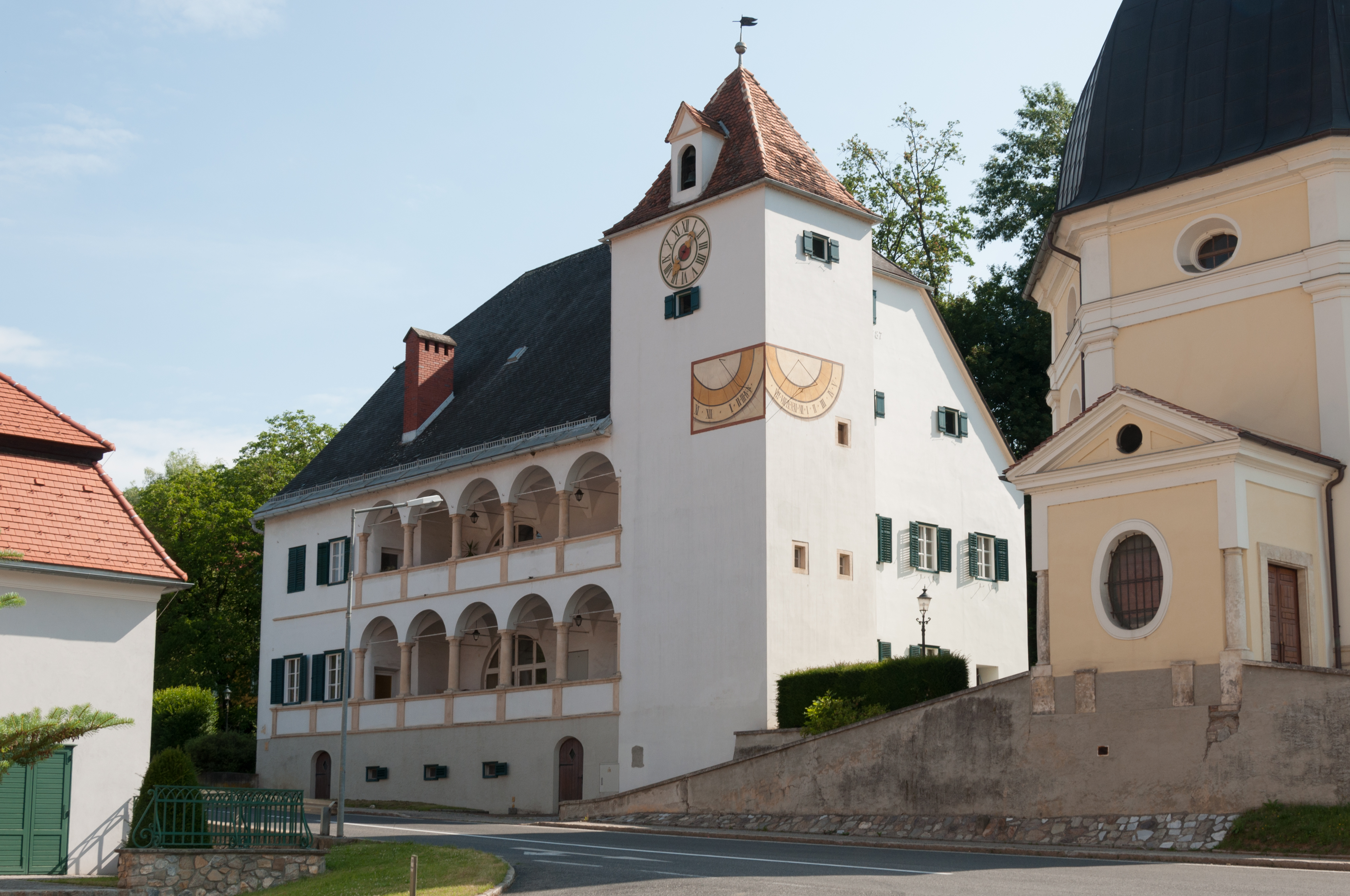 Pfarrhof